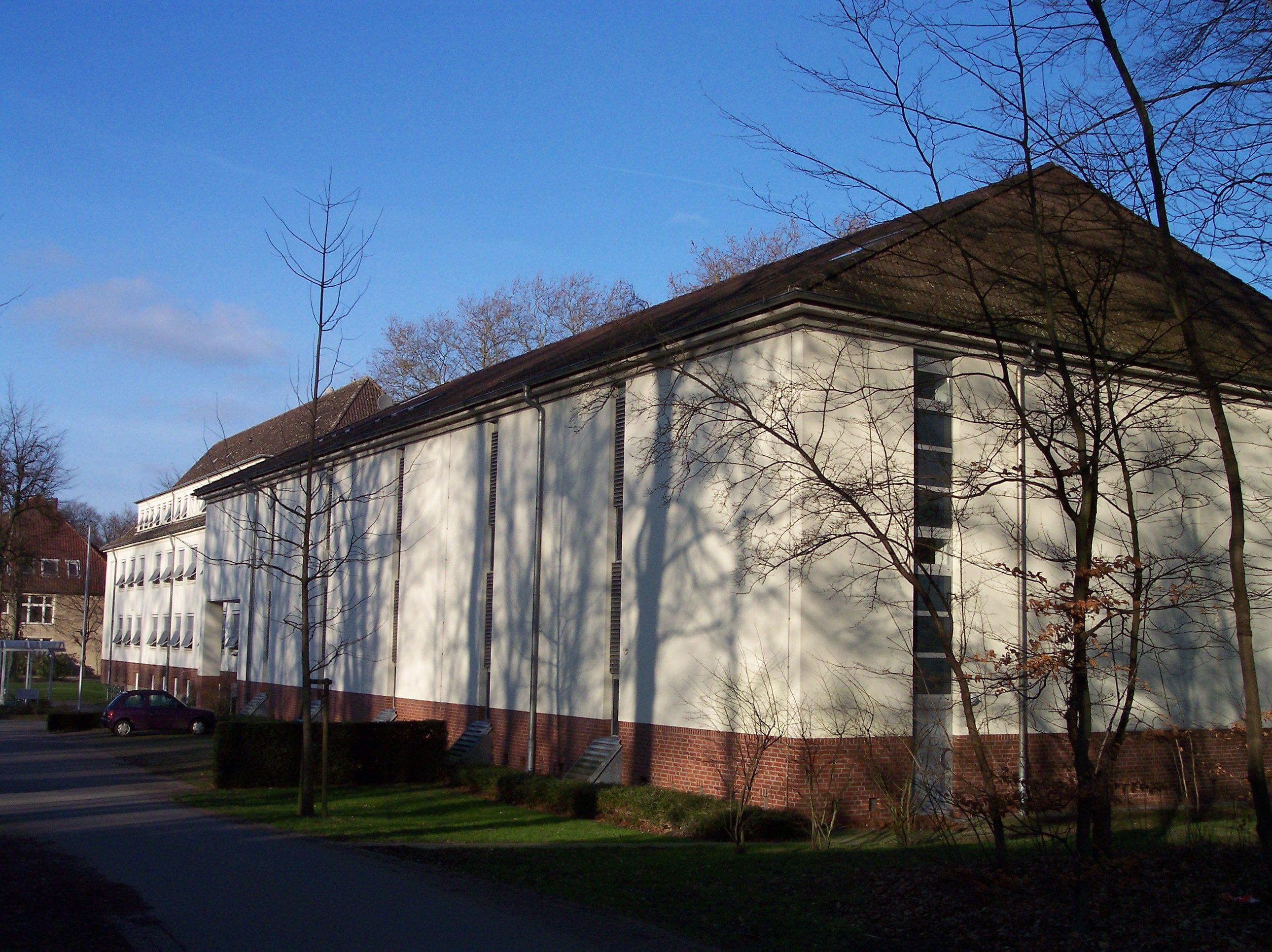 Im Vordergrund: Magazingebäude des LWL-Archivamts (früher: Westfälisches Archivamt); Im Hintergrund: Verwaltungsgebäude eben dieses